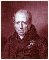 De Wilhelm von Humboldt